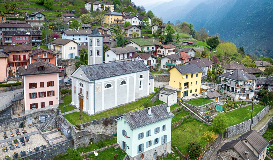 Ortschaft Verdabbio